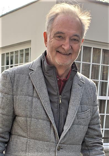 Portrait de Jacques Attali, à Paris en 2020